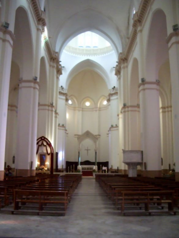 navata centrale del Duomo Tonti.